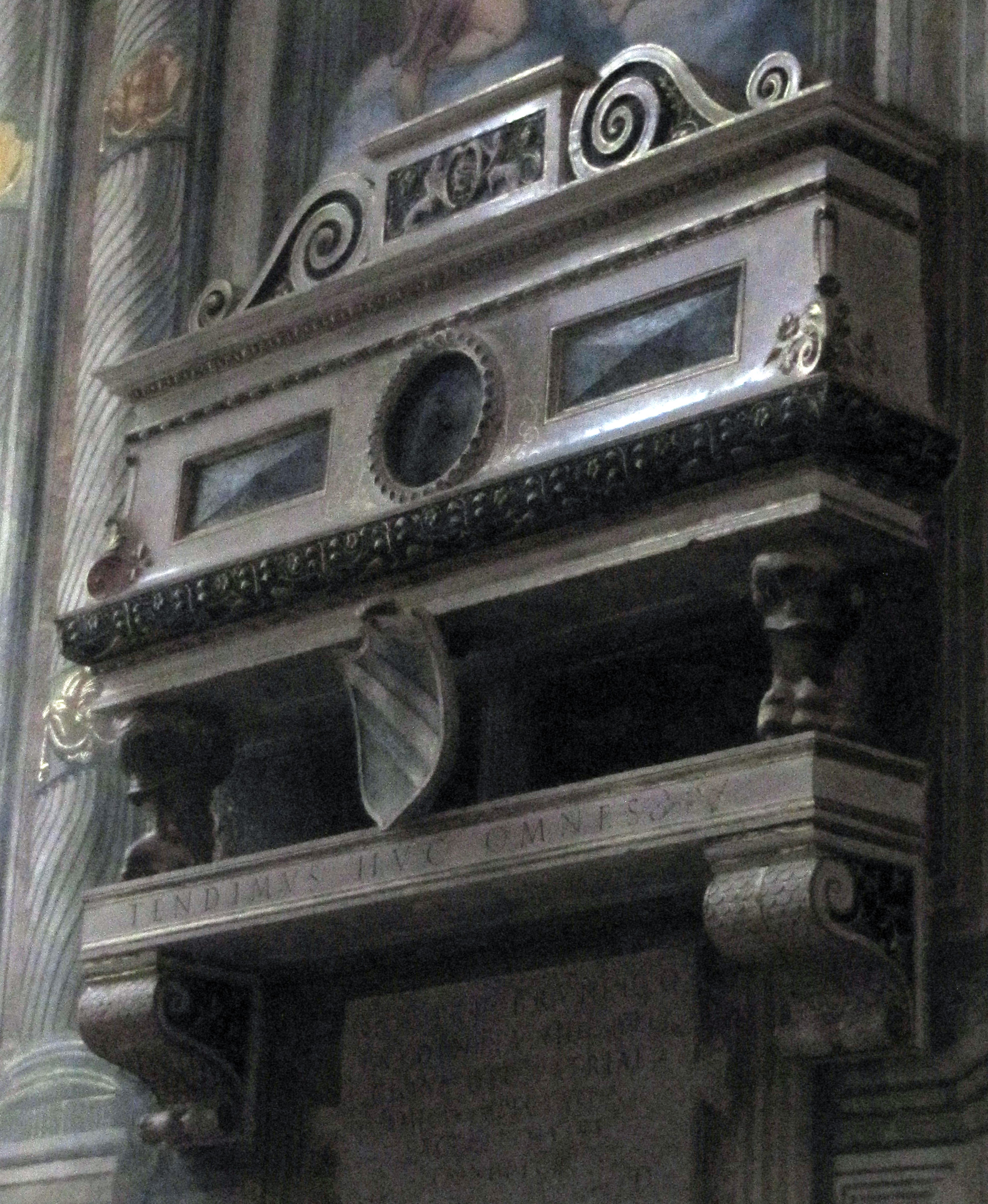 monumento funebre di gaspare brunelli, san francesco, brescia, gasparo cairano